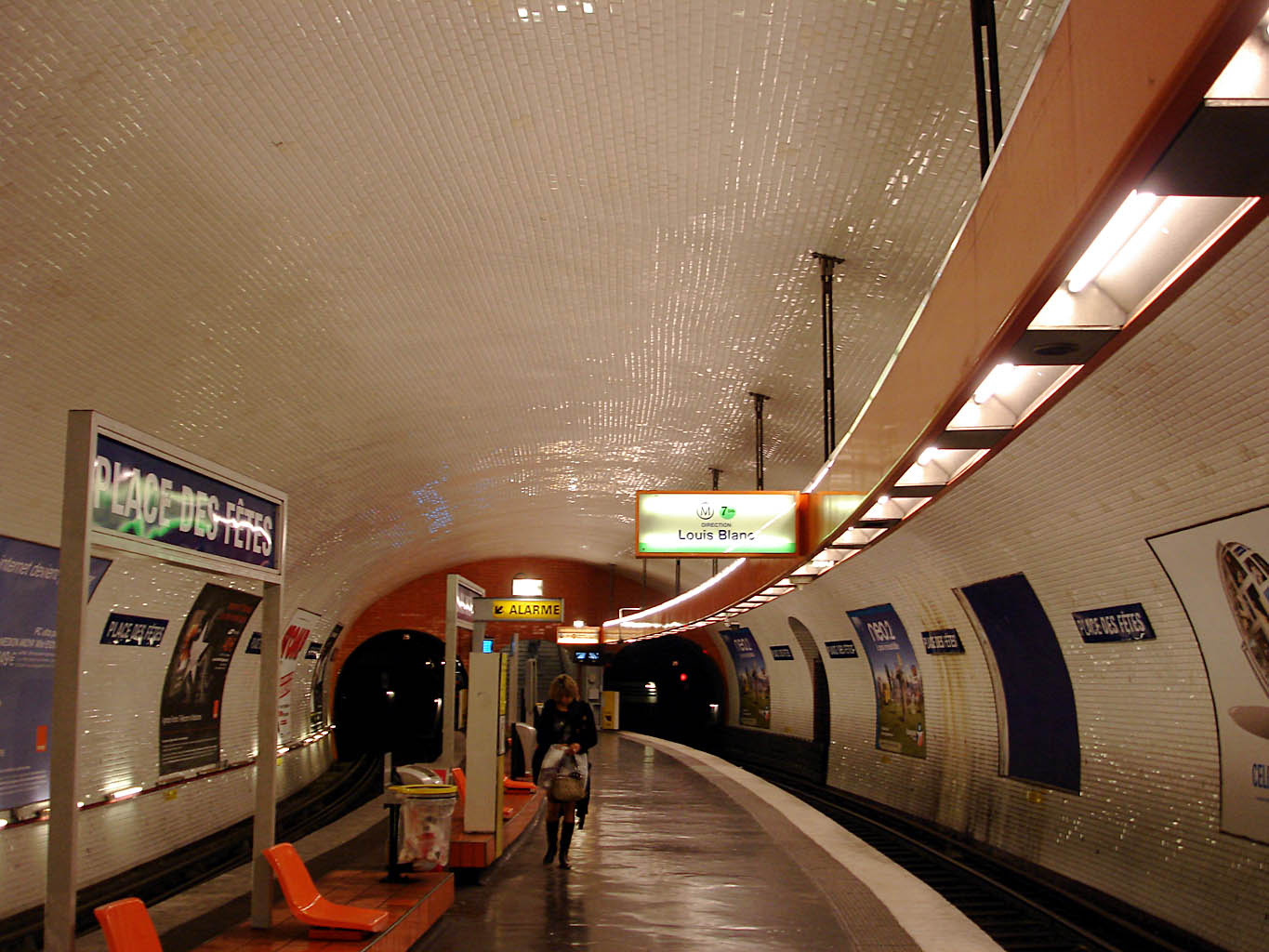 Station Place des Fêtes, de la ligne 7bis du métro de Paris, France.